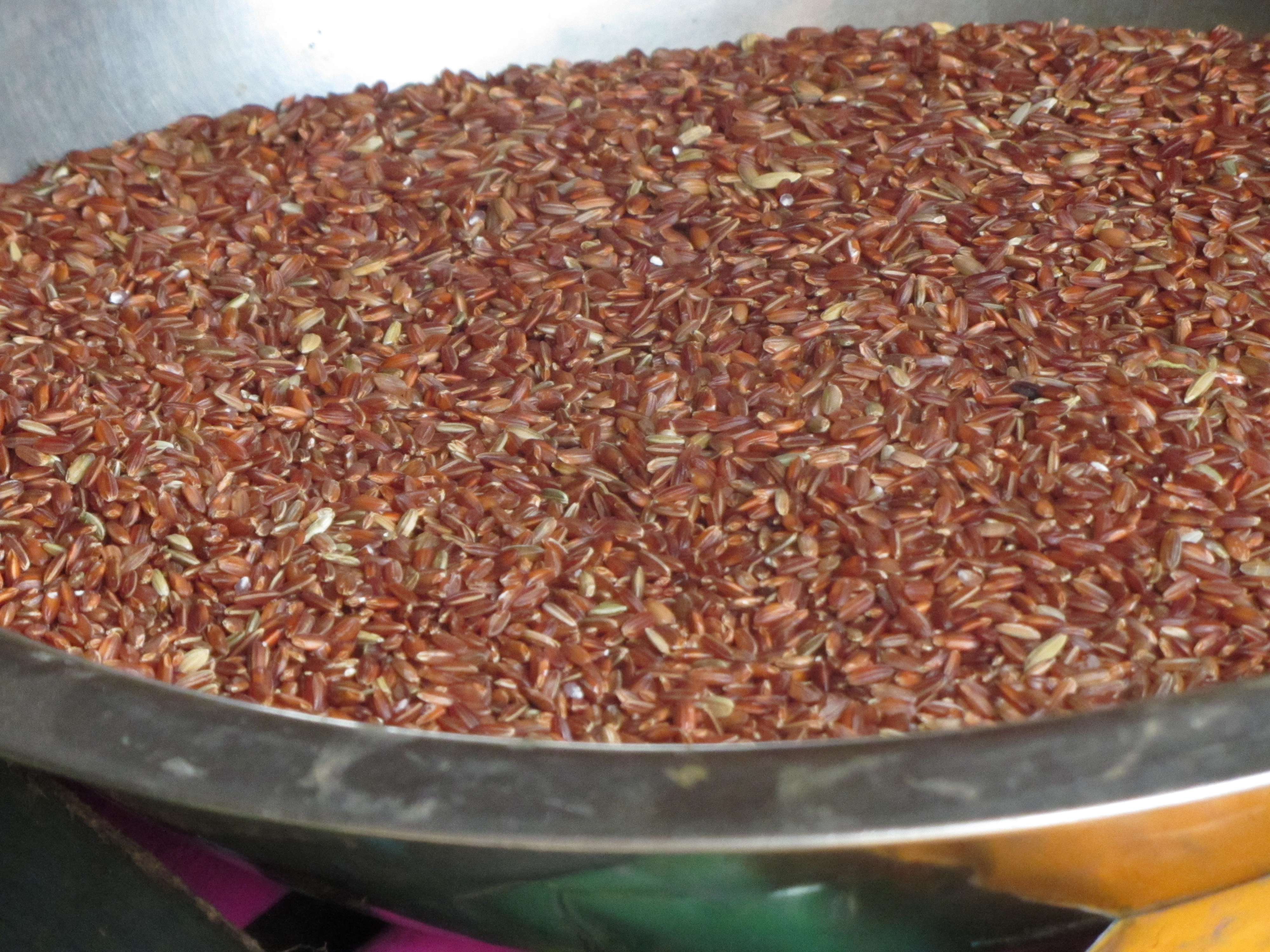 ஐவனம் என்னும் புழுதிக்கார் நெல் போன்று கேரள மாநிலத்தில் நன்செய்யில் விளையும் நெல்லின் செவ்வரிசி.